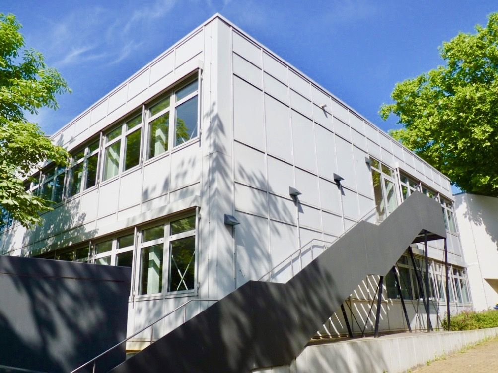 Helmholtzschule (Gymnasium) in Frankfurt am Main. Der mit zusätzlichen Unterrichts- bzw. Klassenräumen 1972 als Erweiterung errichtete IPI-Bau war ursprünglich blau, mit silberner Leistenschalung abgesetzt, und damals ohne Außentreppe. Er steht dort, wo früher ein Schulgarten mit Teich und bepflanzter Verlandungszone bestand. Blick von der Brüder-Grimm-Straße.